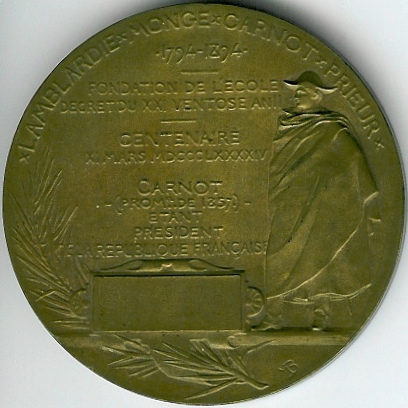 French Ecole polytechnique medal, year 1894;Médaille du centenaire de l'Ecole polytechnique, 1894, avec les noms des fondateurs : Lamblardie, Monge, Carnot, Prieur.